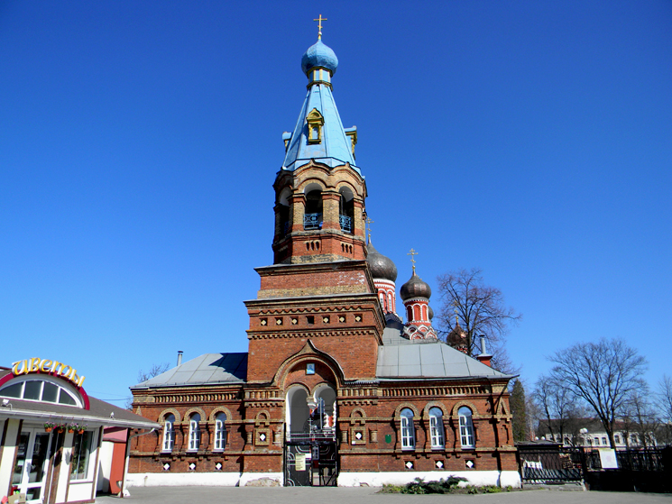 Барысаўскі Васкрасенскі сабор